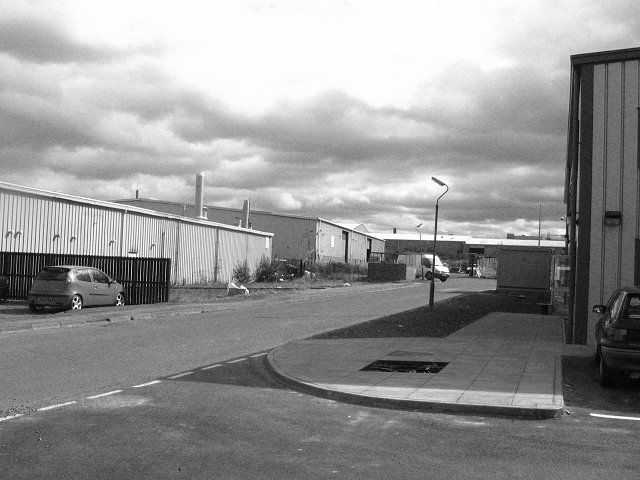 Industrial Estate, Macmerry